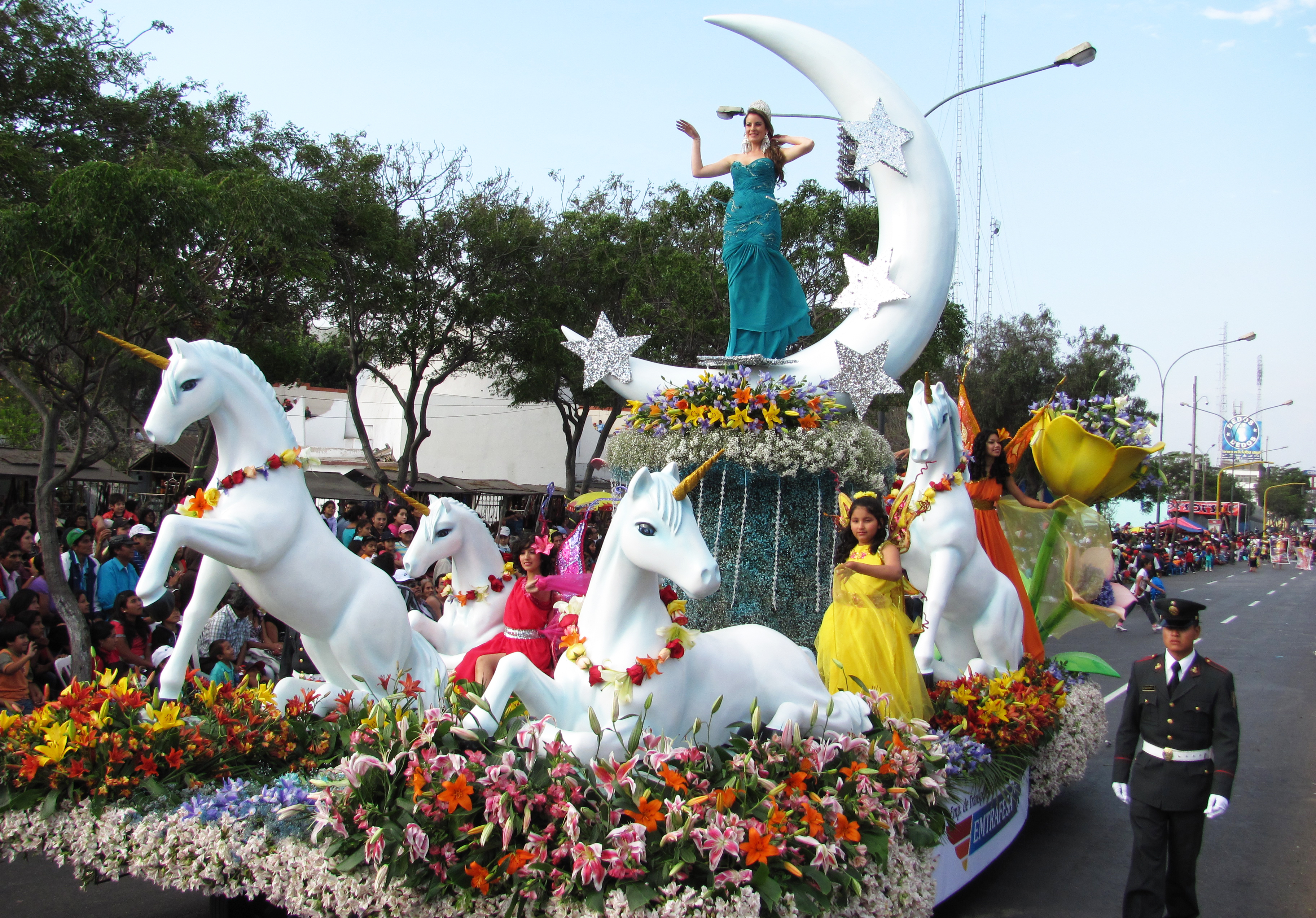 Carro Alegórico en Trujillo. Corso del 62° Festival Internacional de la Primavera.